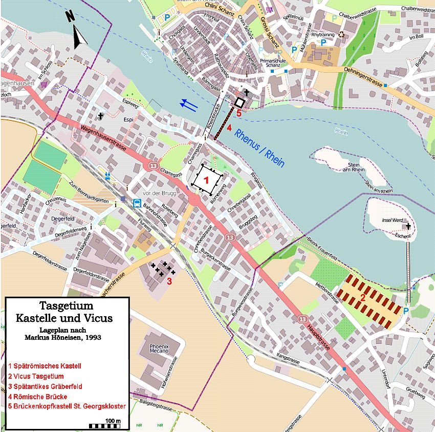 Lageskizze Kastelle, Vicus und Gräberfelder in Eschenz/Tasgetium (CH) 3. bis 5. Jahrhundert n.Chr.